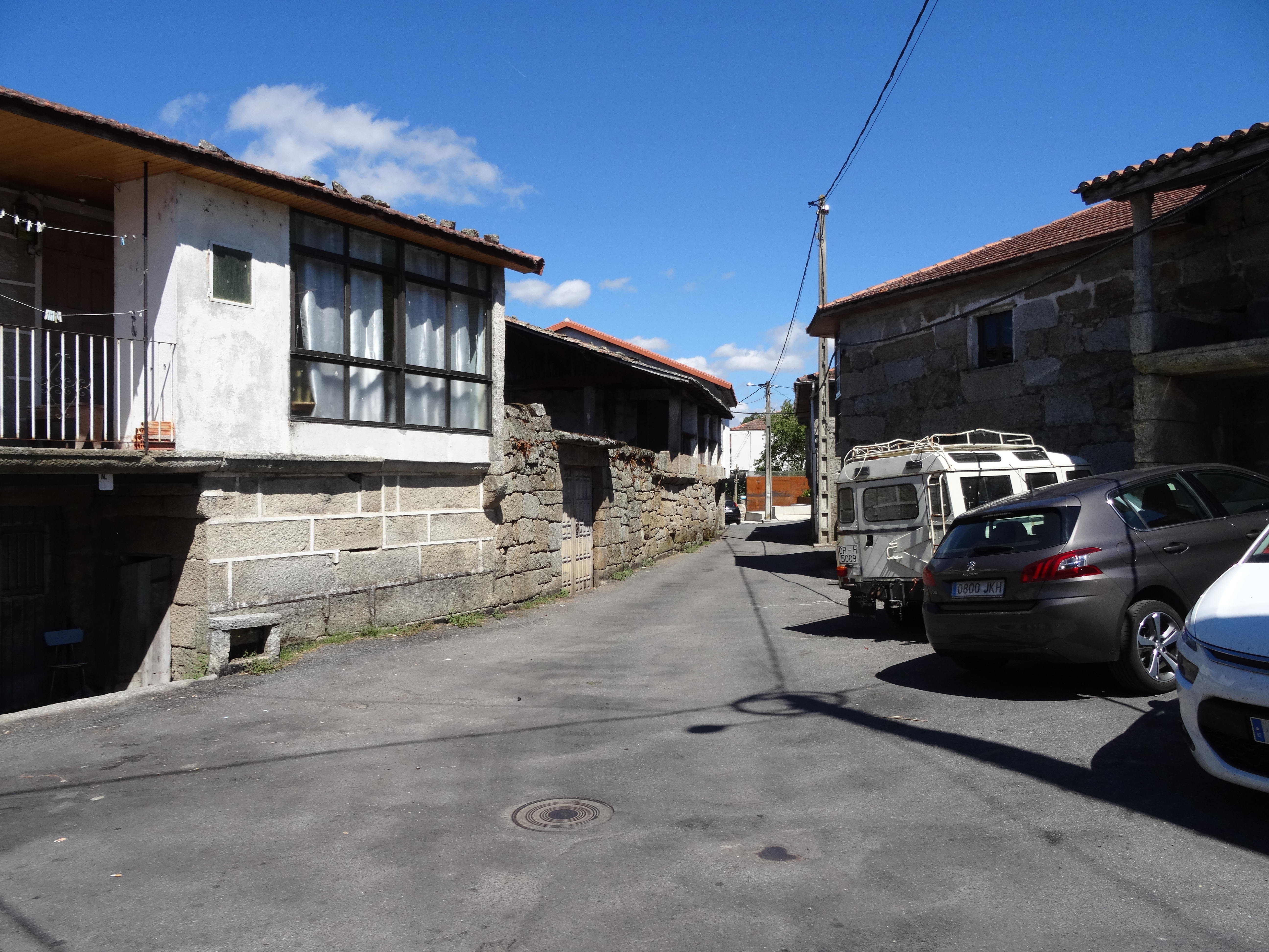 Ver título.